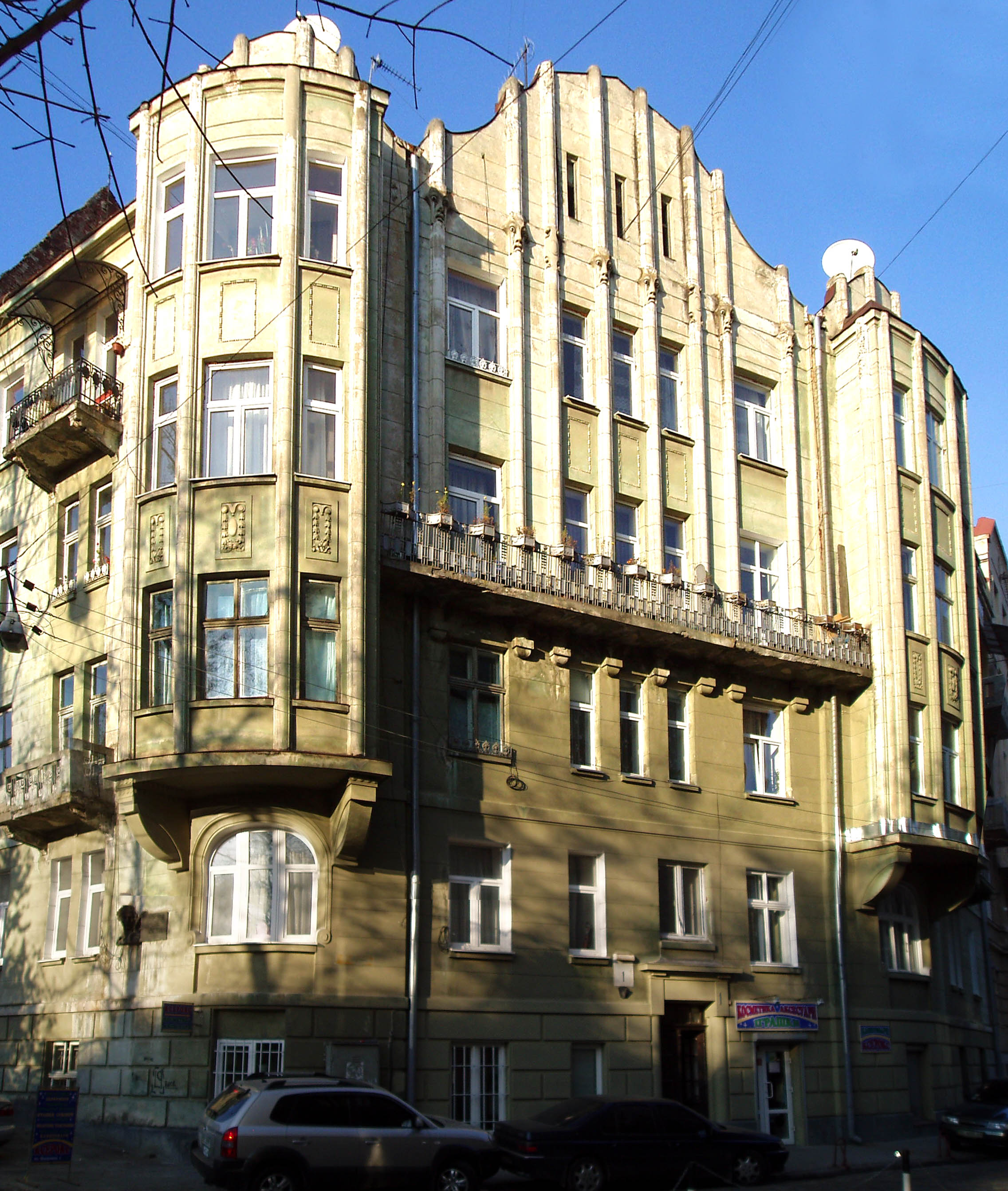 Будинок на площі Шашкевича, 1 у Львові. Проект Йосипа Делькевича (1874-1938) і Філемона Левицького (1873—1922).